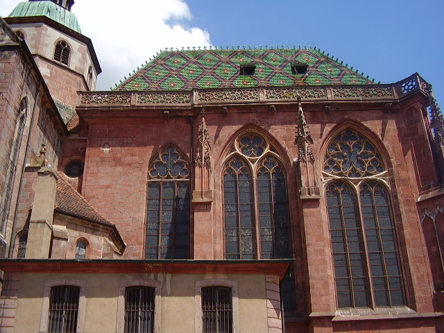 Sélestat, Saint-Georges